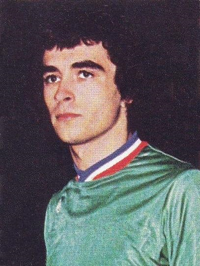 Dominique Rocheteau saison 1975-1976, 'Euro Football 76', Panini figurina n°100.